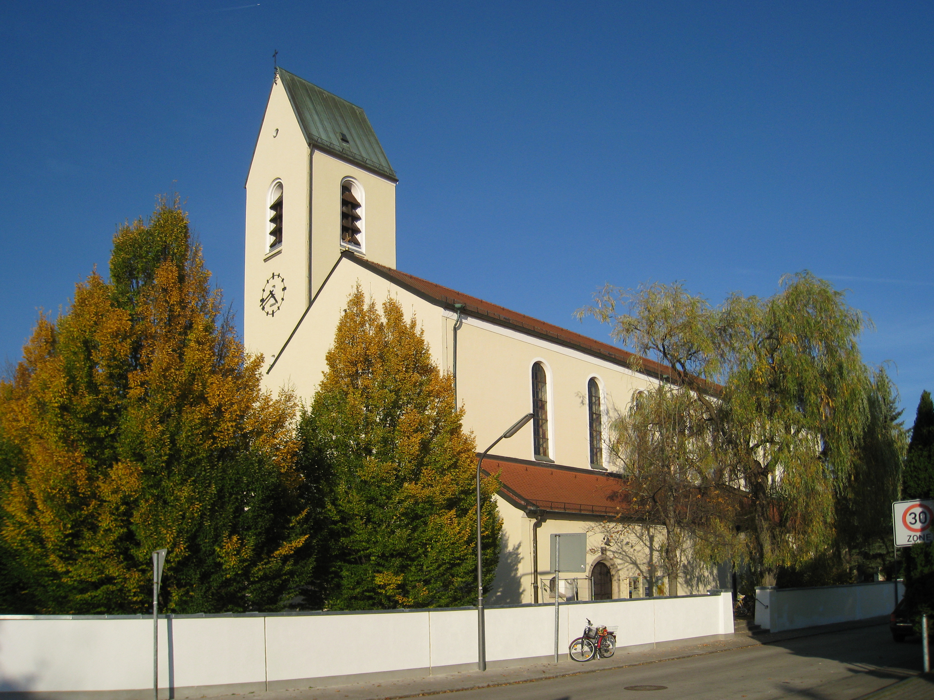 St. Emmeram Kirche in München, Stadtteil Englschalking